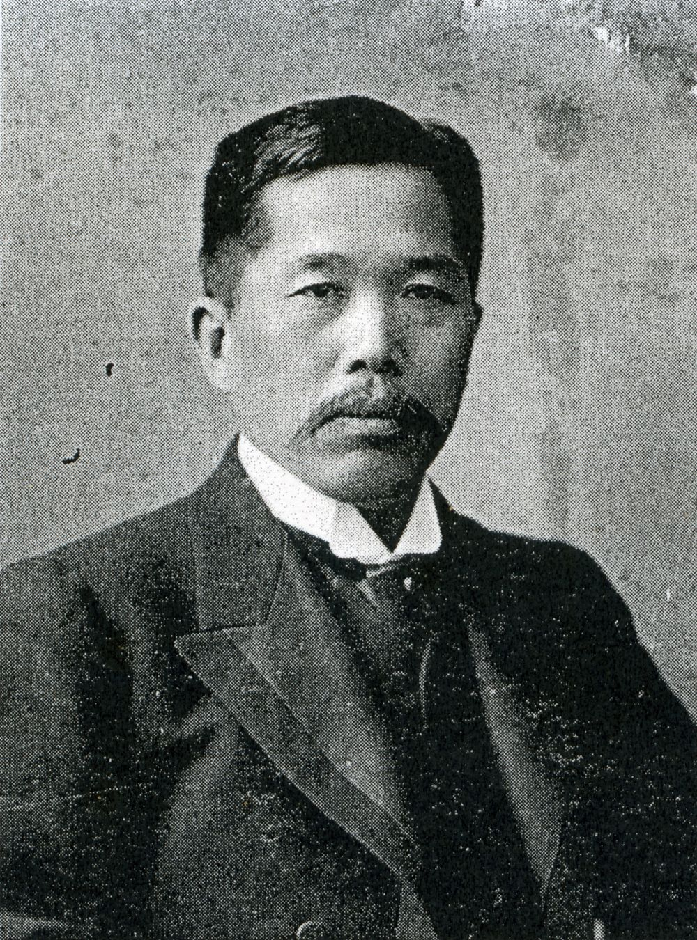 この写真は、中村啓次郎（1867-1937）の写真です。